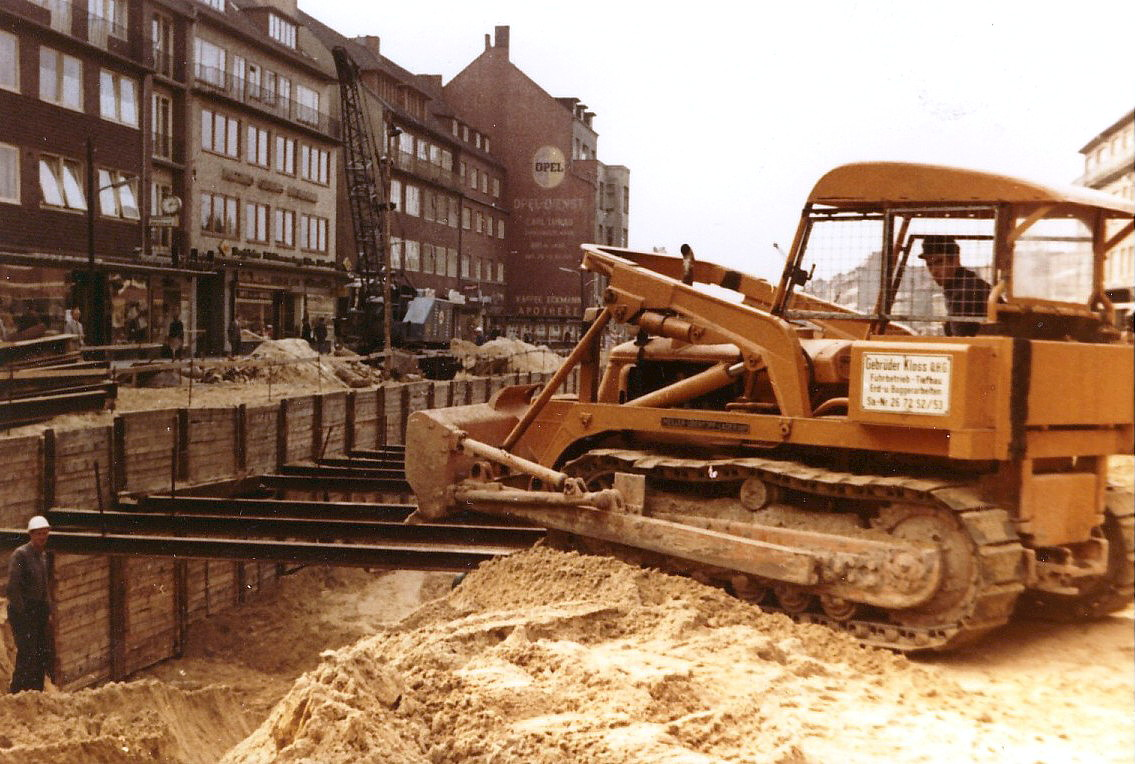 Wandsbeker Marktstr. in Hamburg-Wandsbek, U-Bahnbau 1961